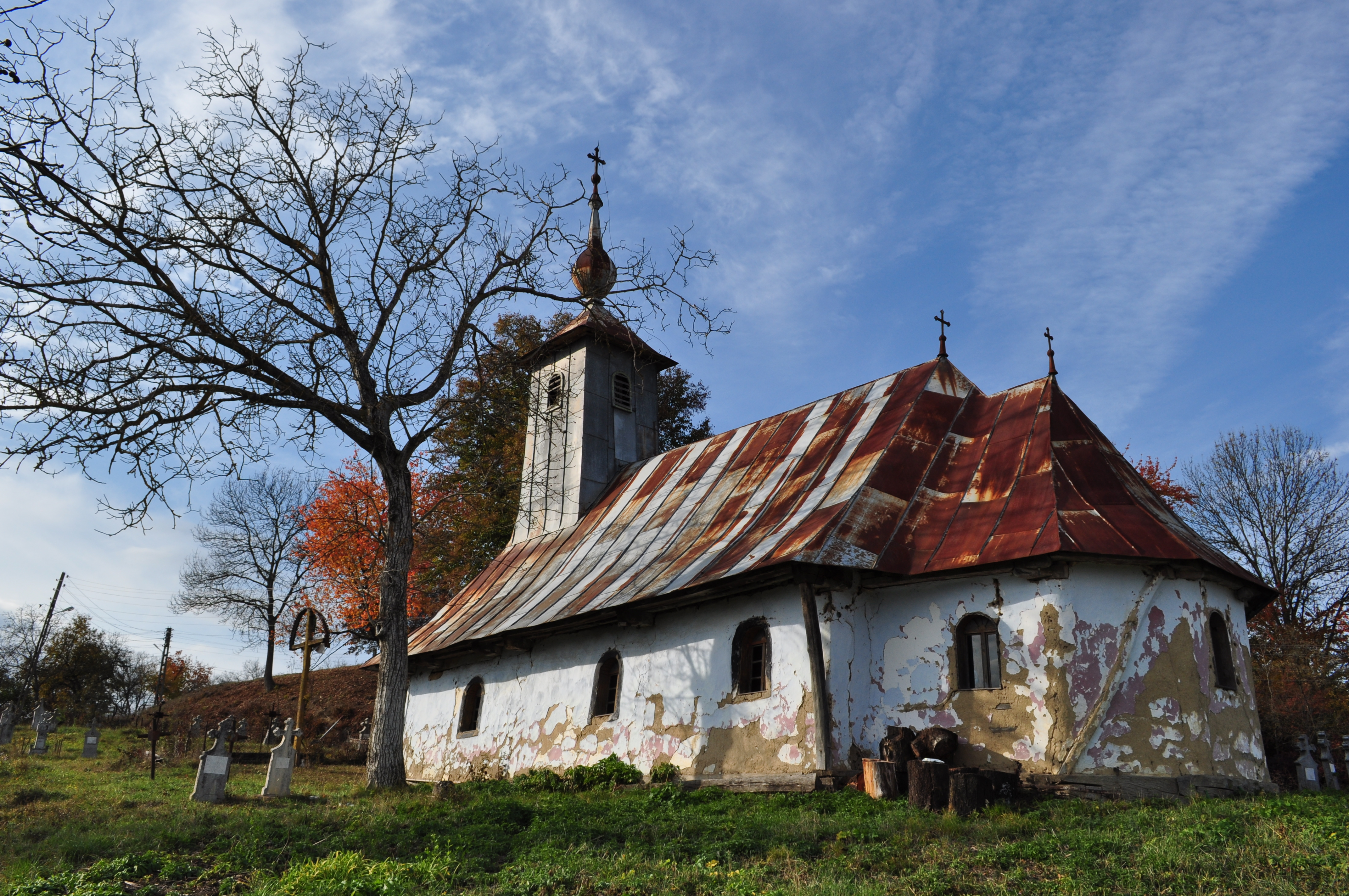 Biserica de lemn „Nașterea Maicii Domnului” din Săucani, județul Bihor